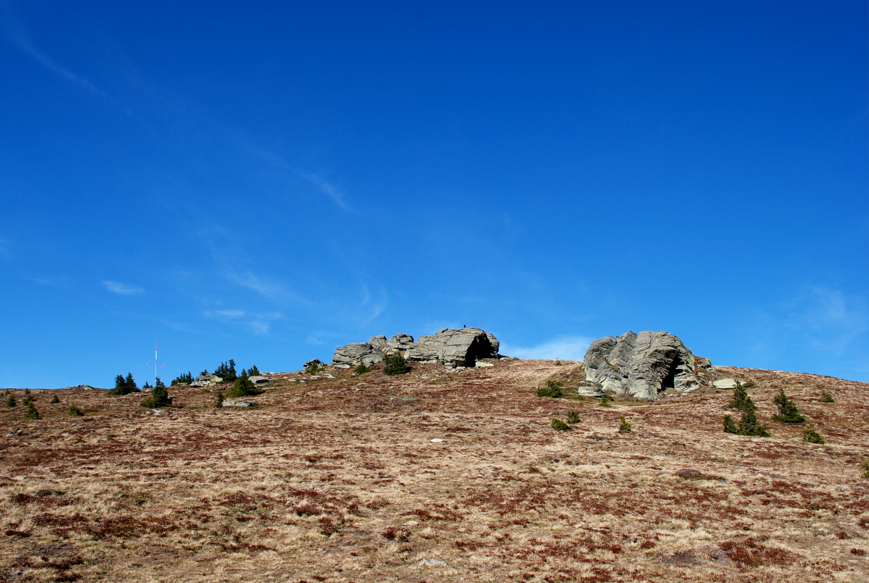 Handalm, Koralpe, Österreich: Berg und umgebende Landschaft (Almgebiet) in der mittleren Koralpe, ab 2014 Standort des Windparks Handalm